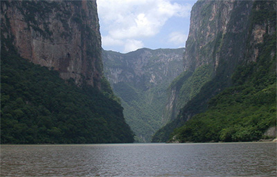 Una pequeña foto de la Depresión de Chiapas